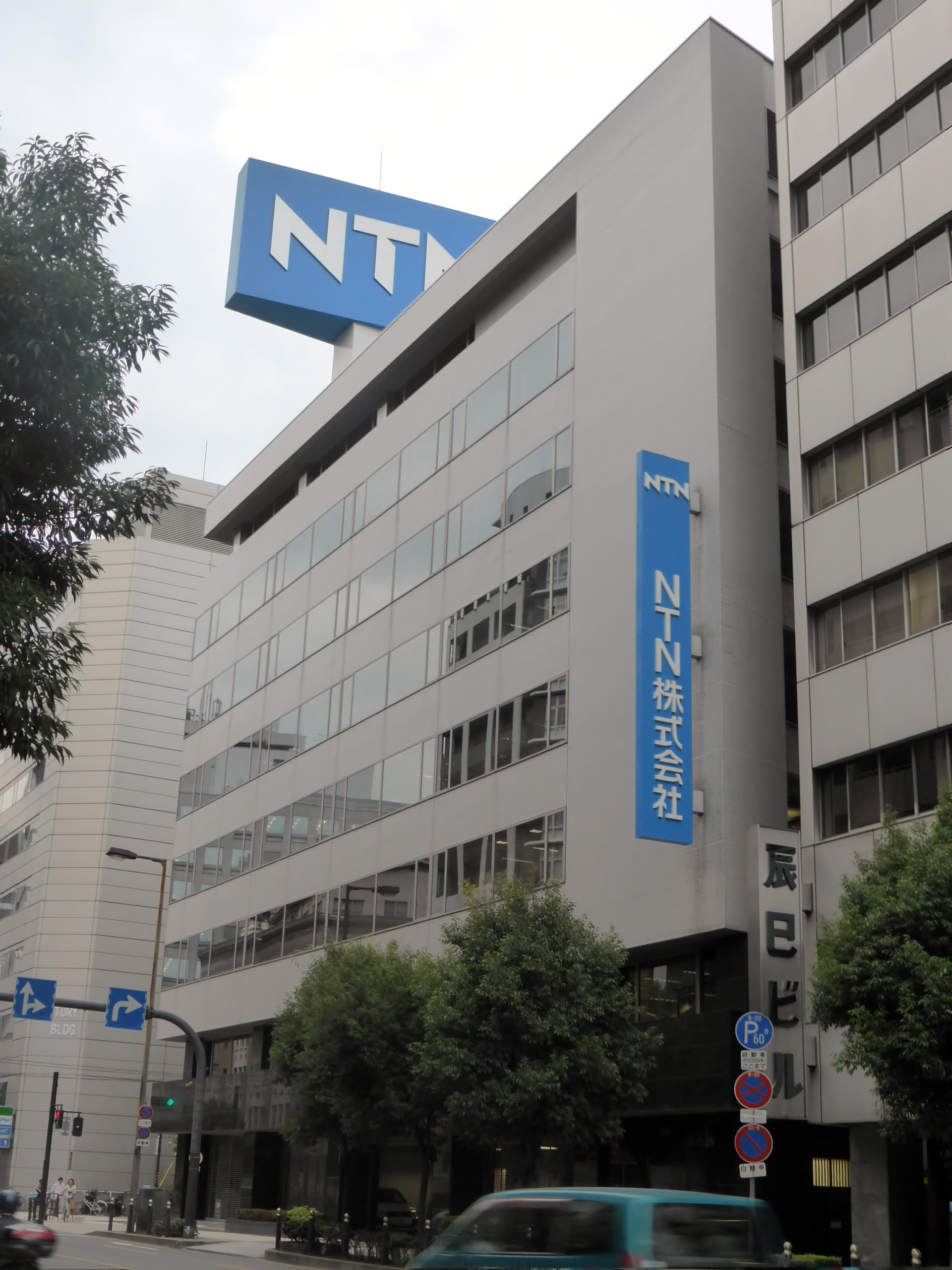 NTN株式会社本社を撮影。